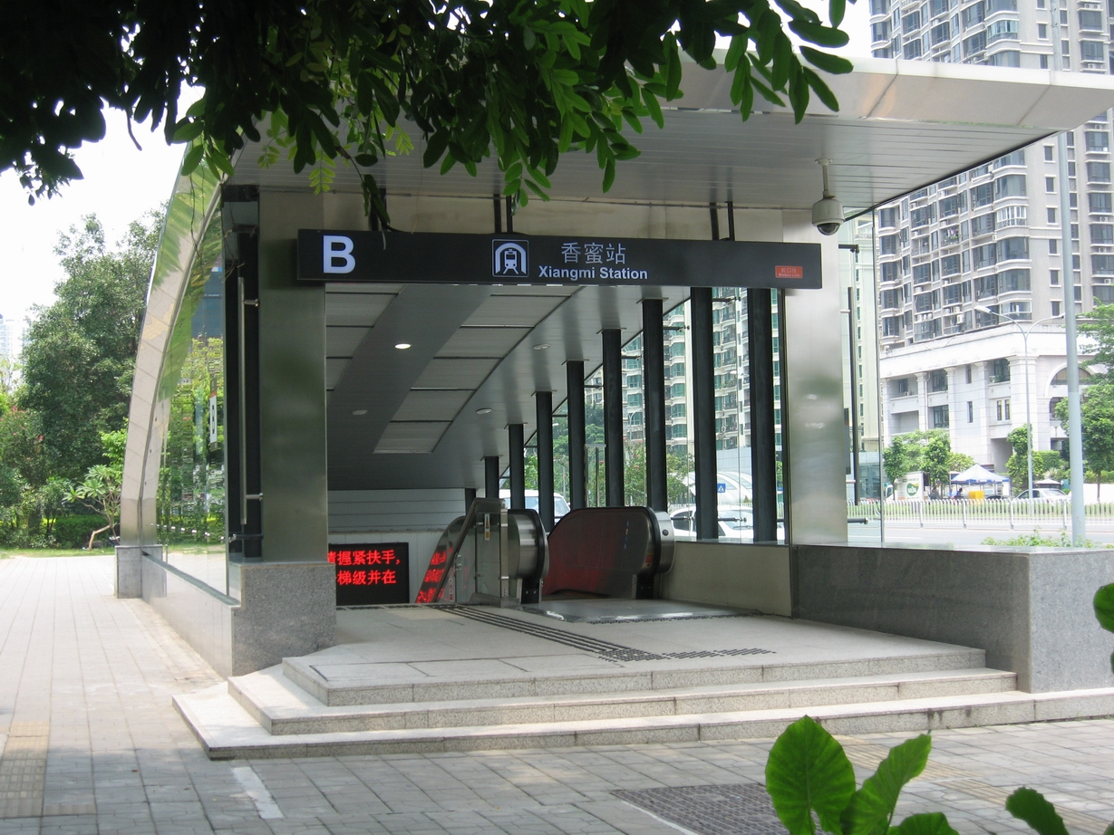 深圳地铁2号线香蜜站B出口